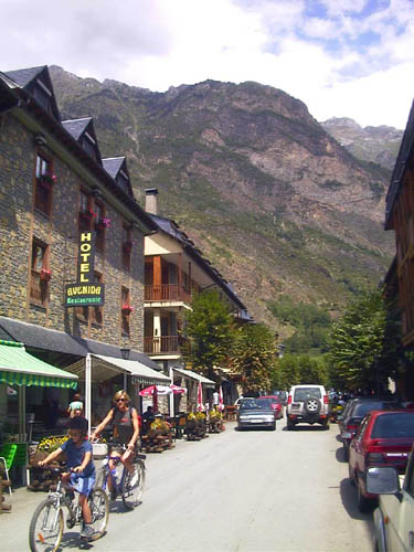 Benasque (Huesca). Avenida de los Tilos. Autor: Rafaelji. Fotografía digital reducida. Tomada en julio de 2001.